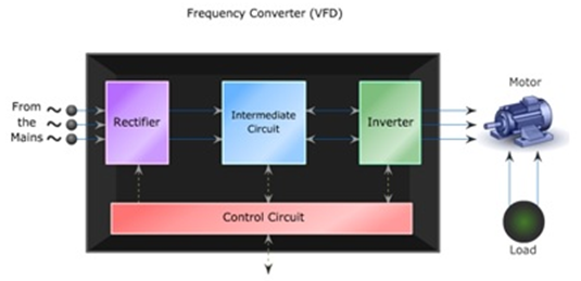 Förenklad frekvensomvandlare. Frekvensomvandlare kan delas in i fyra huvudkomponenter